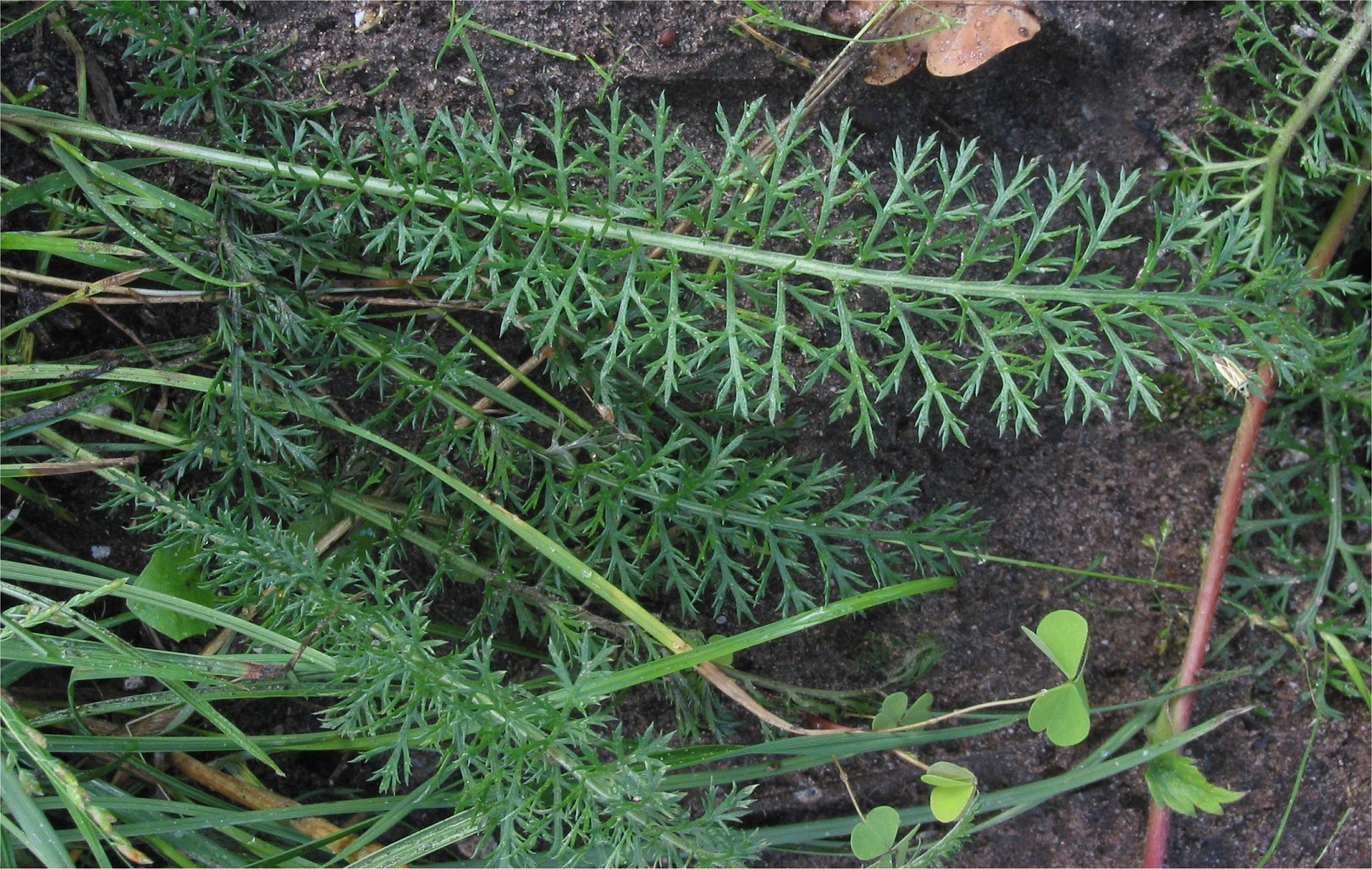 (nl: Gewoon duizendblad dubbelveerdelig) Achillea millefolium leaves